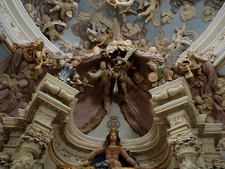 Opera mia